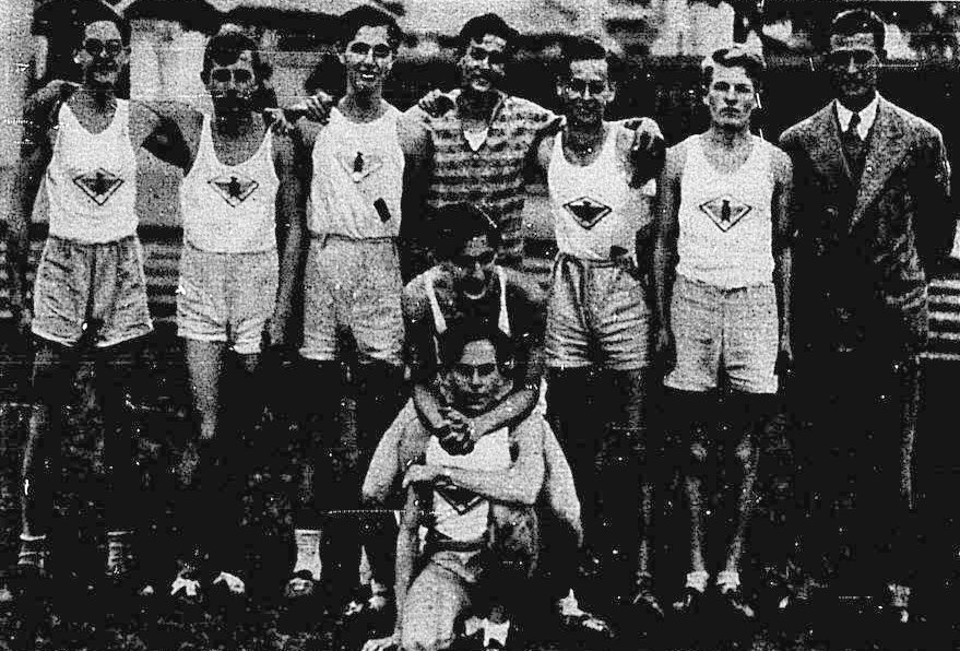 Athletismo: turma de 8 athletas da Escola Allemã, de São Paulo, vencedora do terceiro campeonato collegial de athletismo daquelle Estado. Ao lado o instructor Rudolf Dobermann.